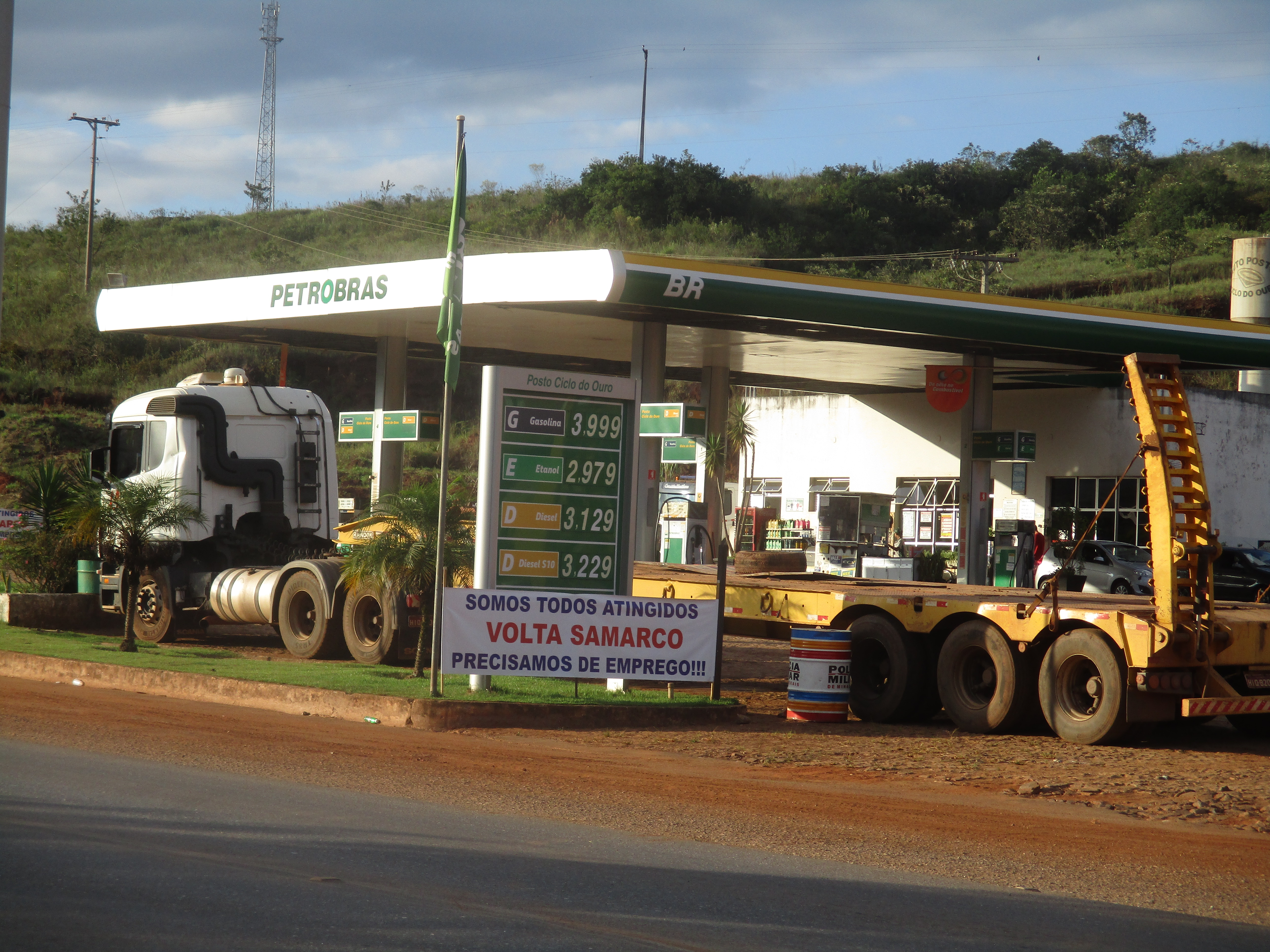 Nesta imagens, alguns locais de Antônio Pereira mostram sua vontade na volta das atividades por parte da Samarco; demonstrações similares existem em Mariana.